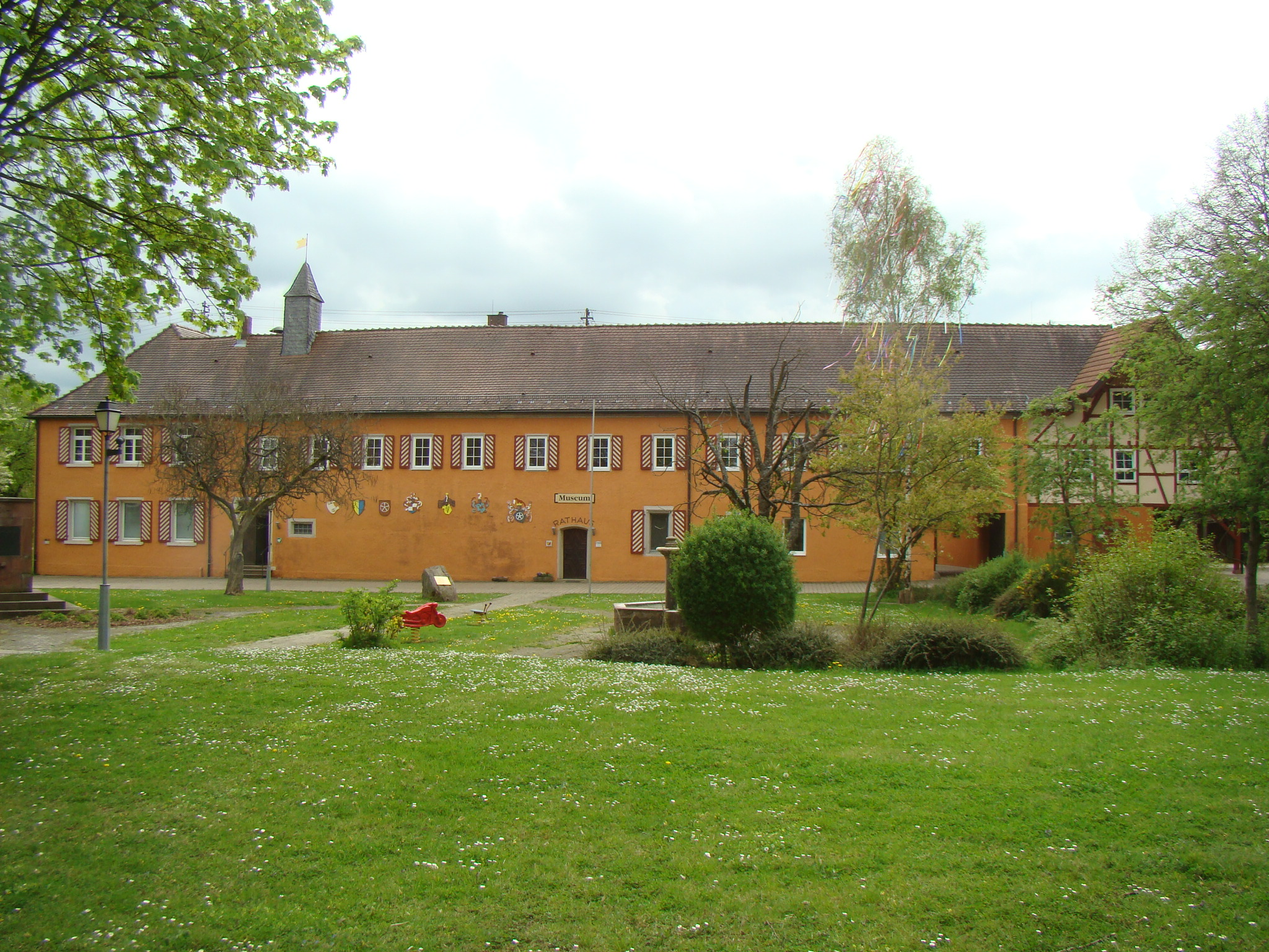 Großeicholzheim, Schloss